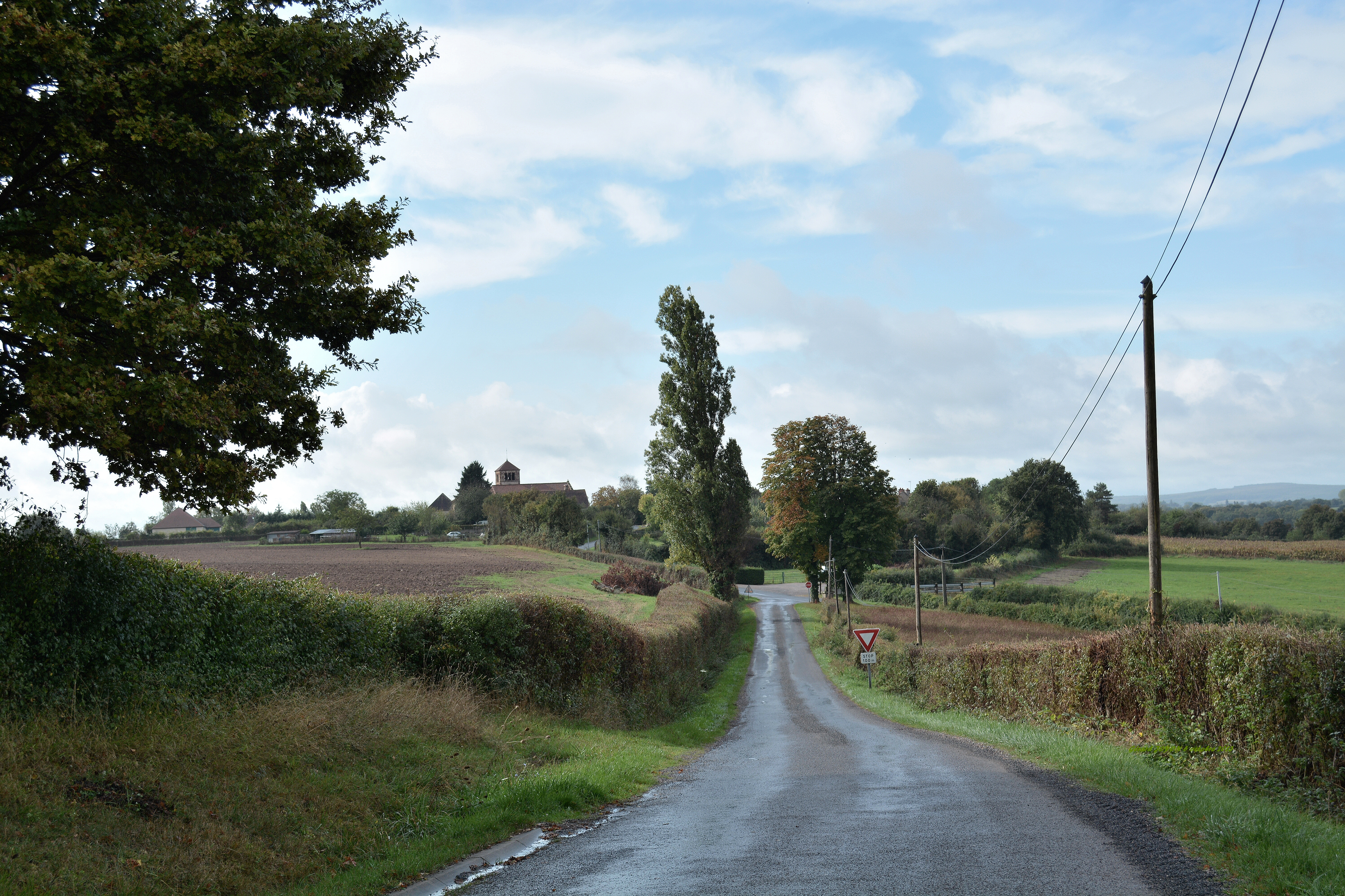 Photo prise le 5 octobre 2013 au nord du village de MARIGNY.